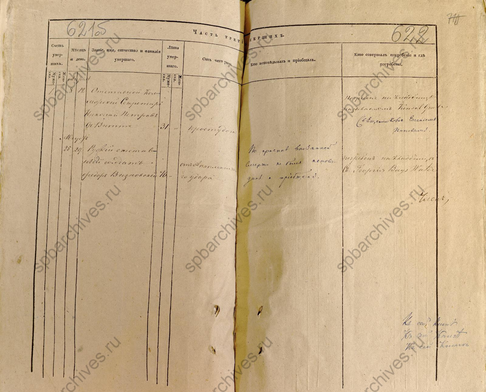 Выписка. Метрическая книга за 1844 год. ЦГИА СПб. ф.19. оп.123. д.1